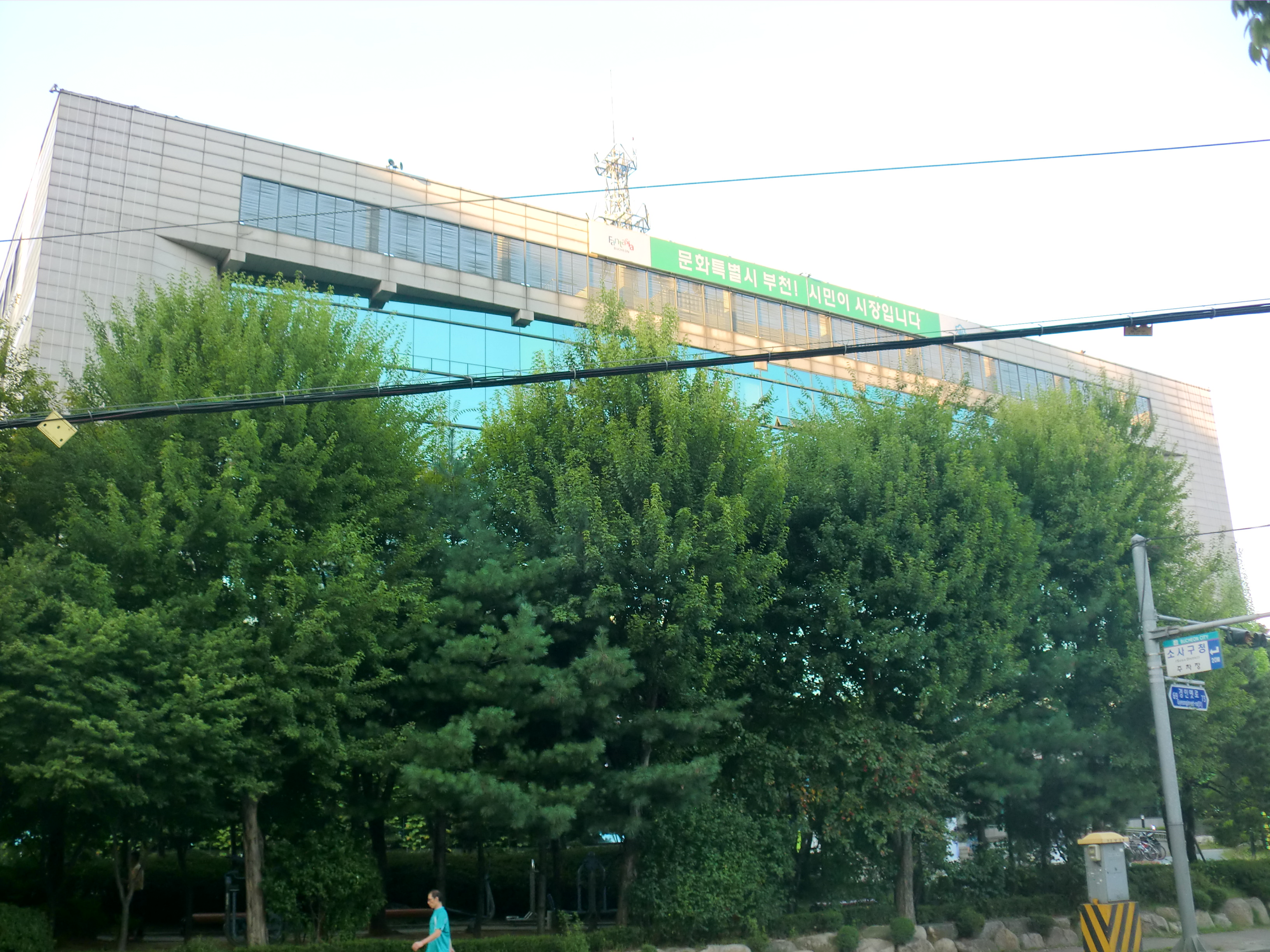 부천시 소사구에 있는 소사구청